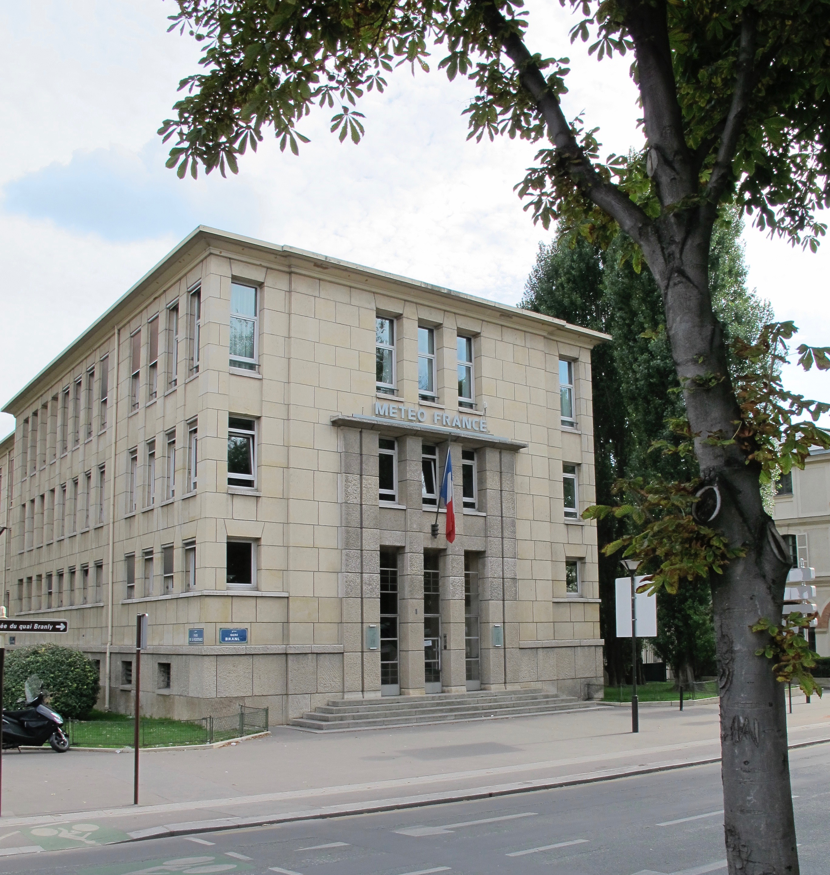 Siège de Météo France jusqu'en 2011 (Paris)